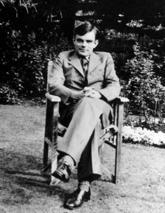 Alan Turing az 1930-as években.